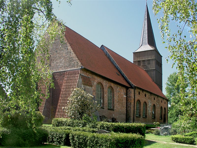 Haselau Kirche Nordwand 2007